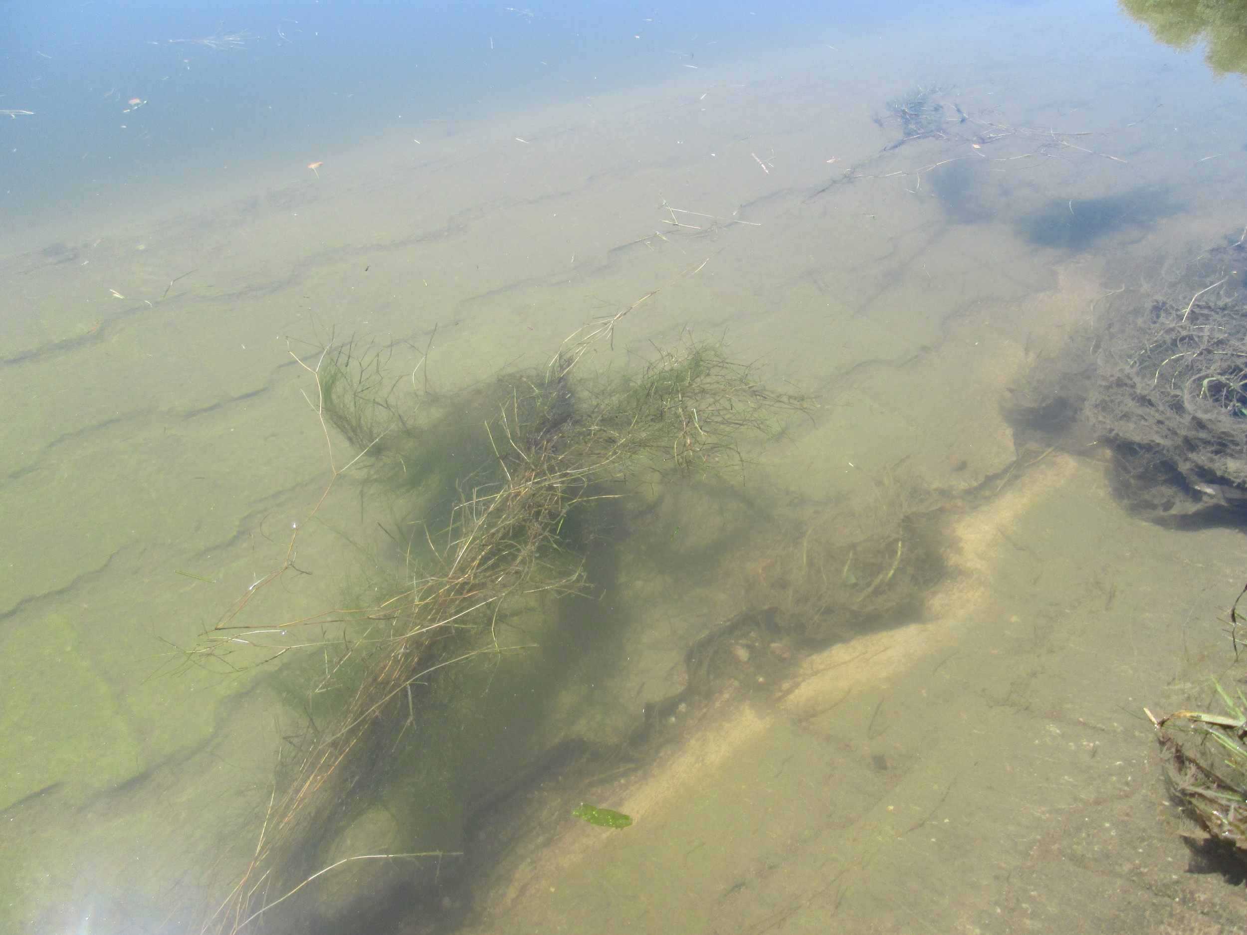 Haarblättrige Laichkraut (Potamogeton trichoides) im Kraichbach im Landschaftsschutzgebiet „Hockenheimer Rheinbogen“